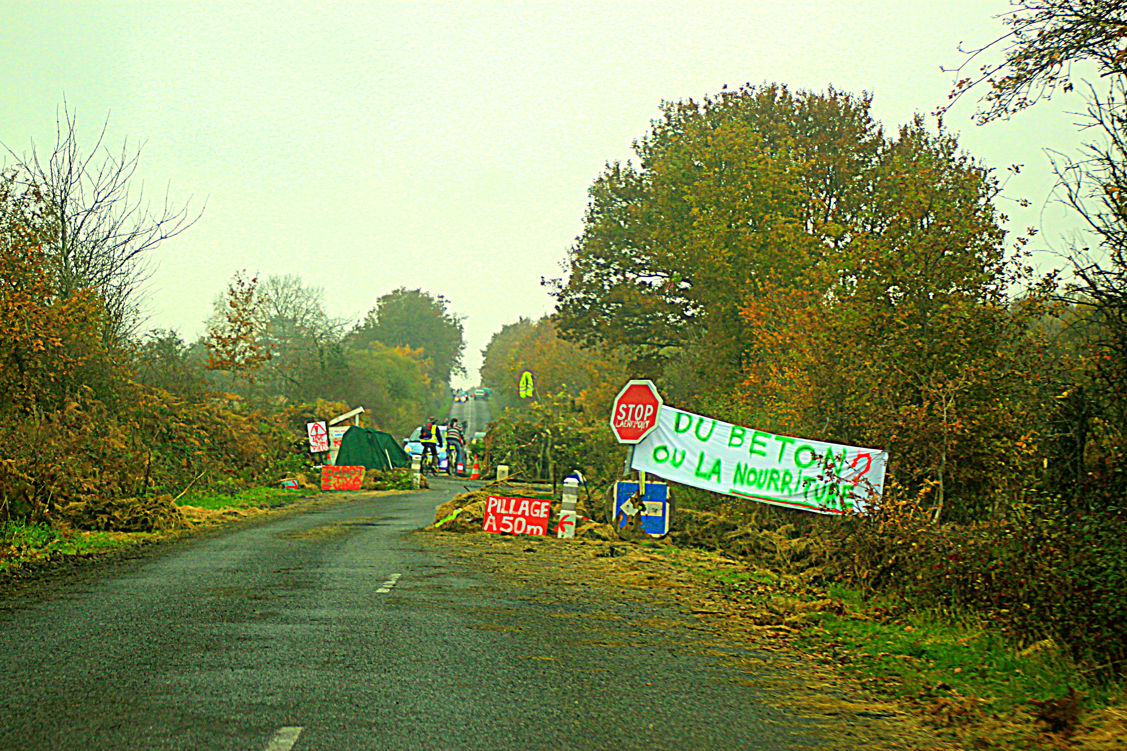 Une des chicanes sur la D281, à l'approche de la ZàD de Fr-44-Notre-Dame-des-Landes.